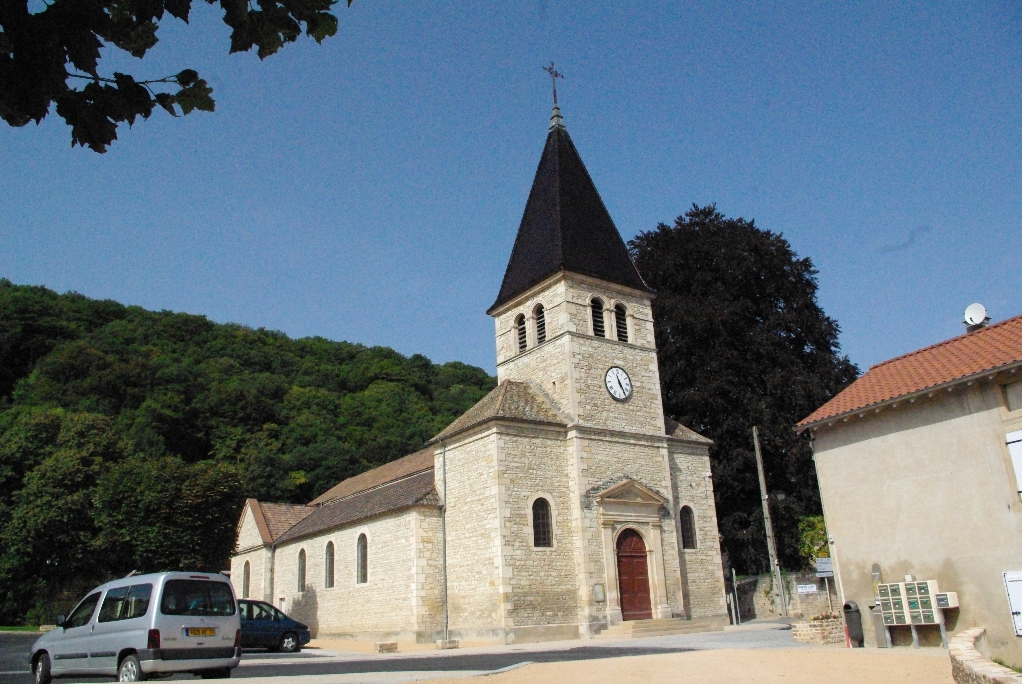 Eglise de Lugny, Saône-et-Loire